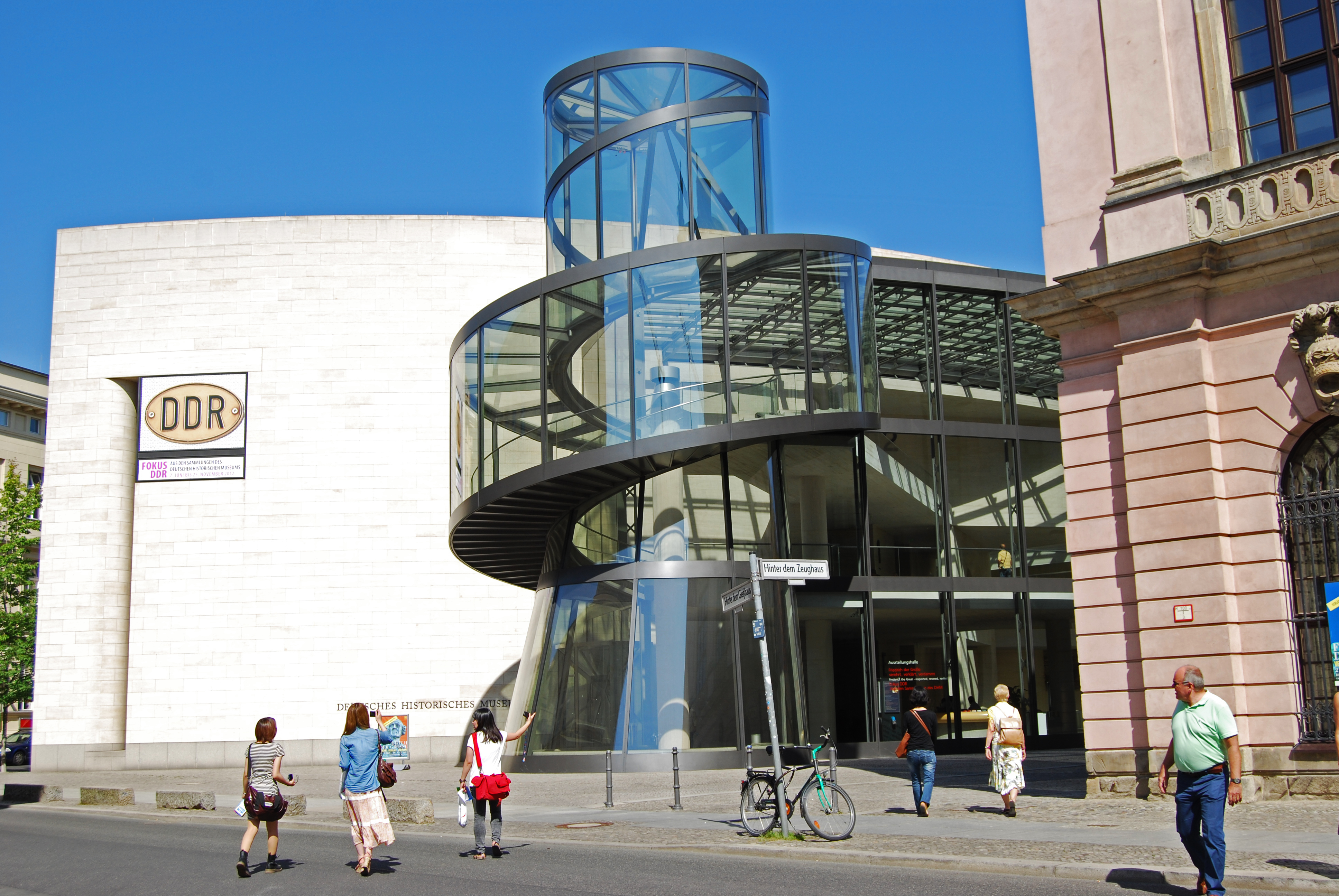 Deutsches Historisches Museum